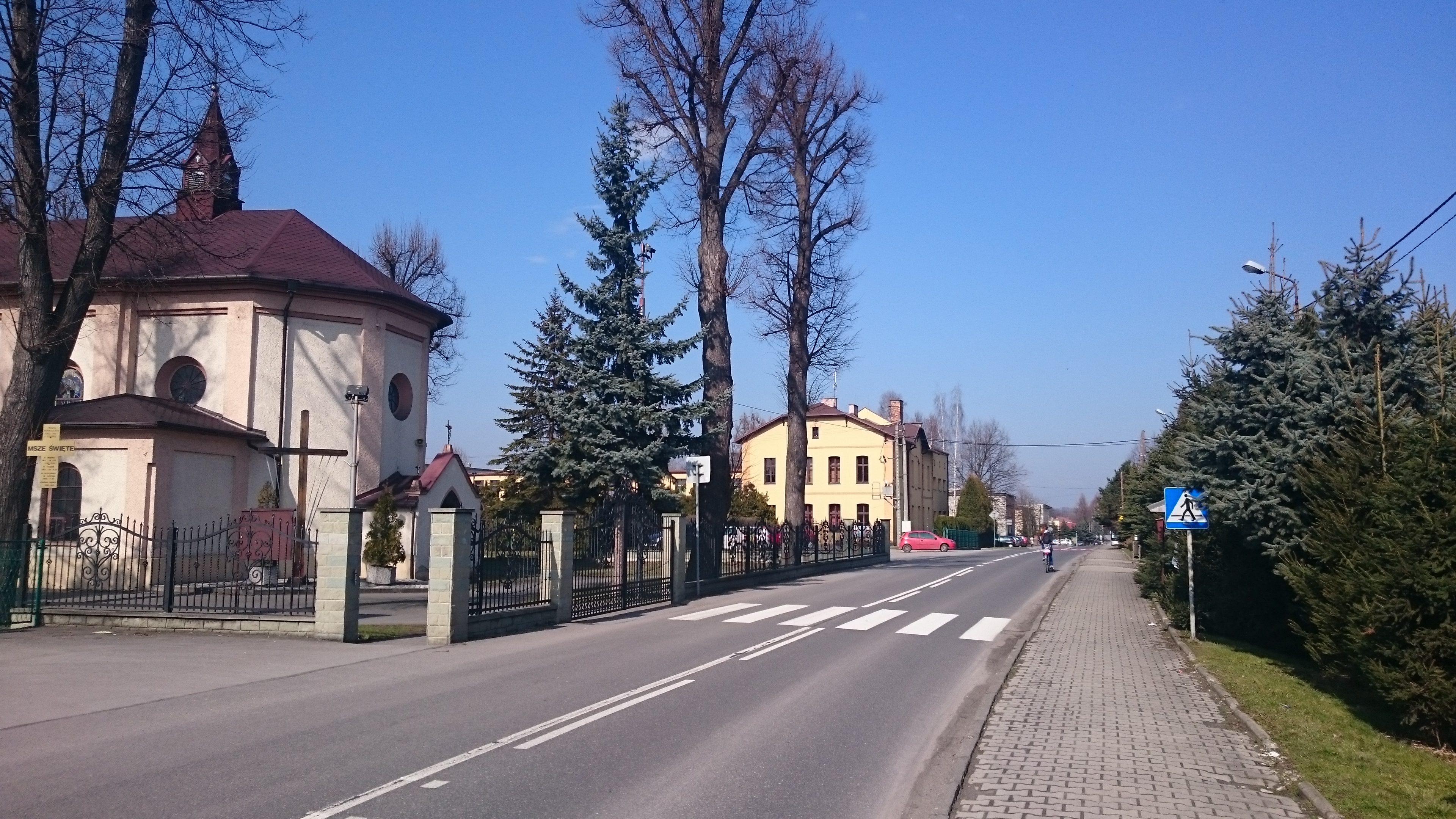 Kaniów, ul. Batalionów Chłopskich przy kościele